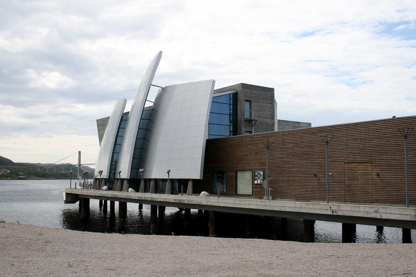 Kystkultursenteret Norveg, Rørvik, Nord-Trøndelag. Arkitekt: Gudmundur Jonsson